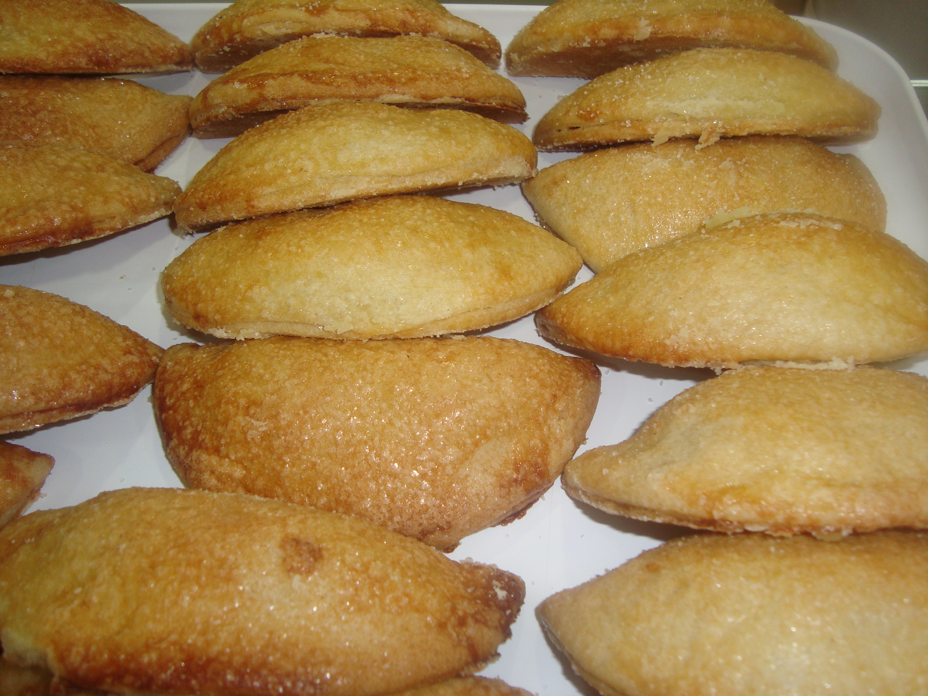 Pastissets de carabassa i mel (Benlloch)